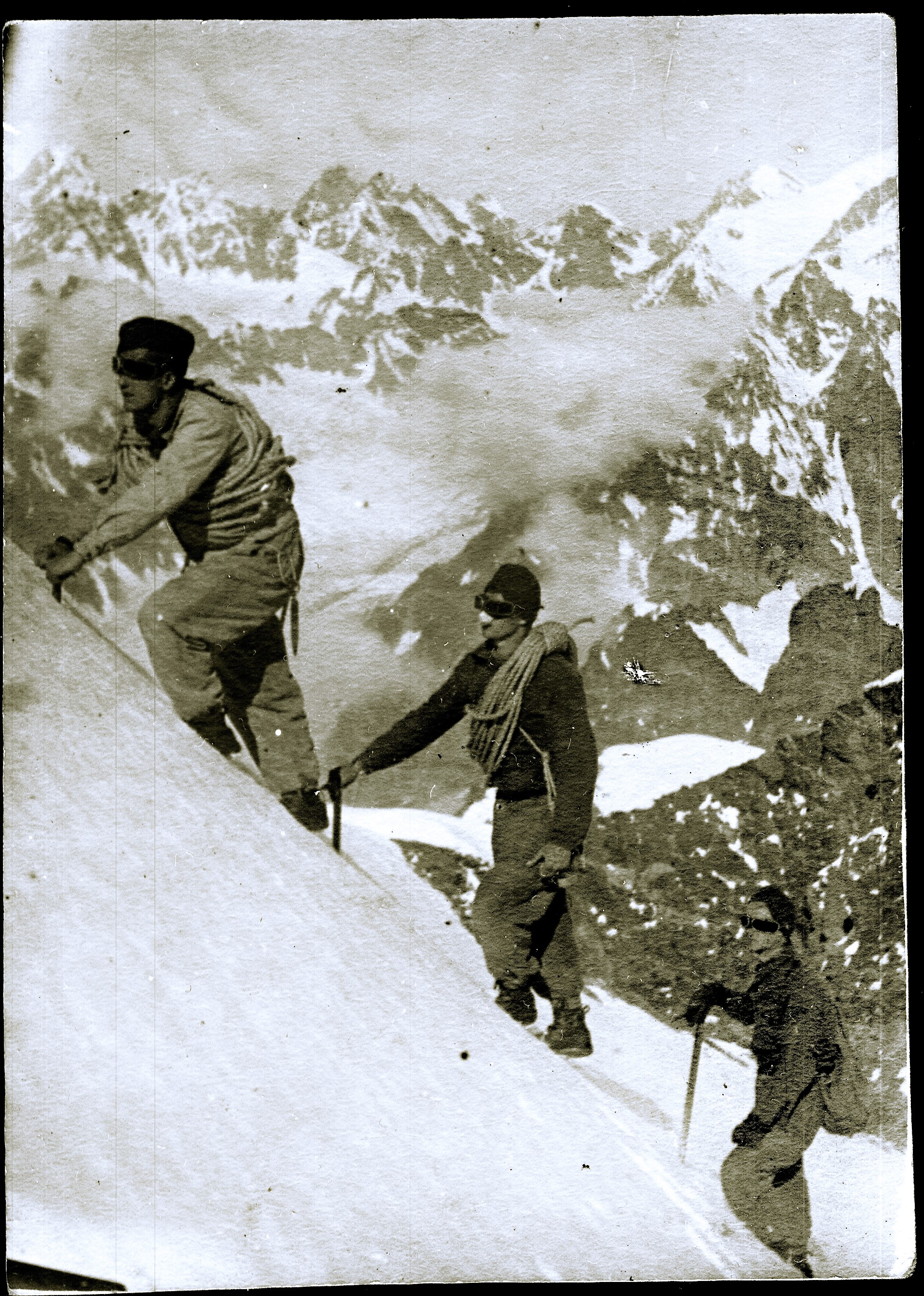 Альпіністське сходження на Кавказі. 1938. Другим іде Євген Замора